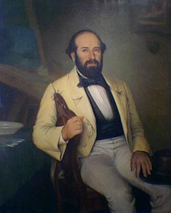 Retrato de Santiago Calzadilla